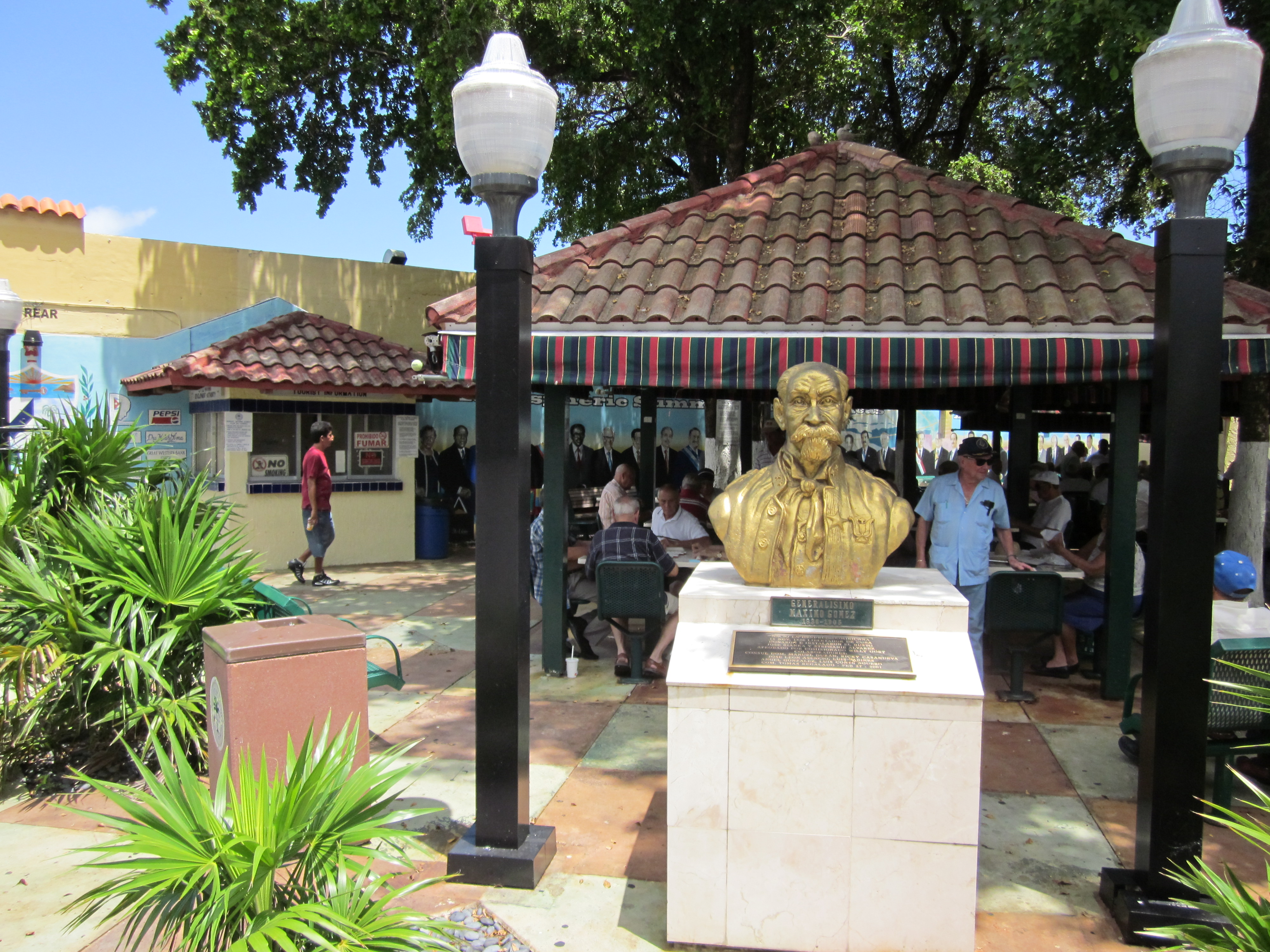 Calle Ocho, Little Havana, Miami Florida.